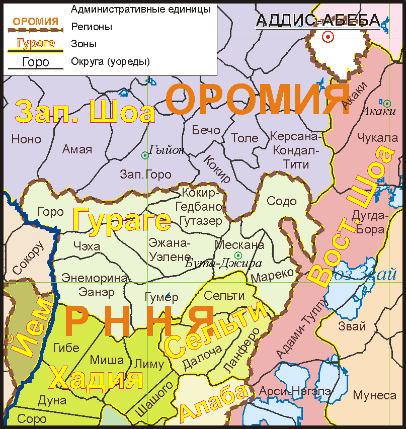 Administrative map of Gurage area (Ethiopia). Административная карта района народов гураге.